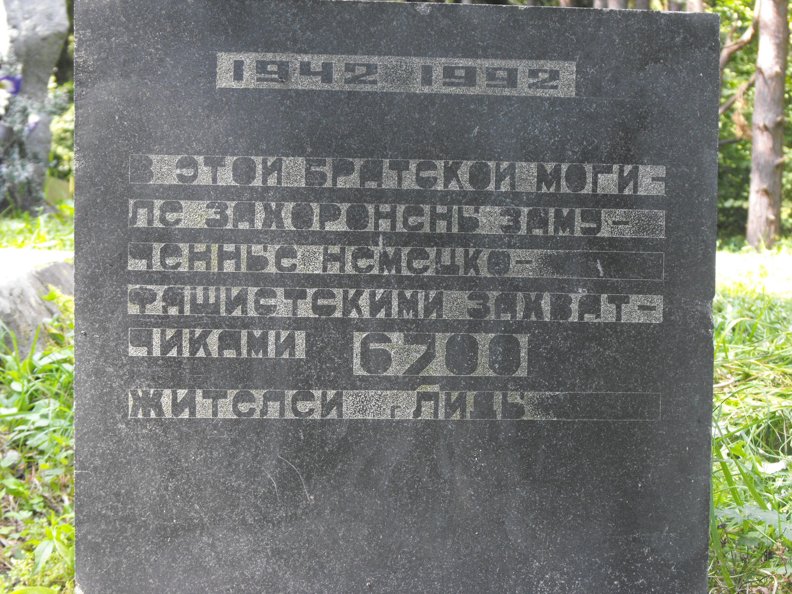 Памятная доска с надписью на русском языке у мемориала на месте убийства нацистами и их пособниками 6700 евреев Лиды. Находится в 150 метрах от кольцевой дороги Лиды на продолжении улицы Красноармейская справа от неё в лесу, рядом с мемориалом "Детская могила".